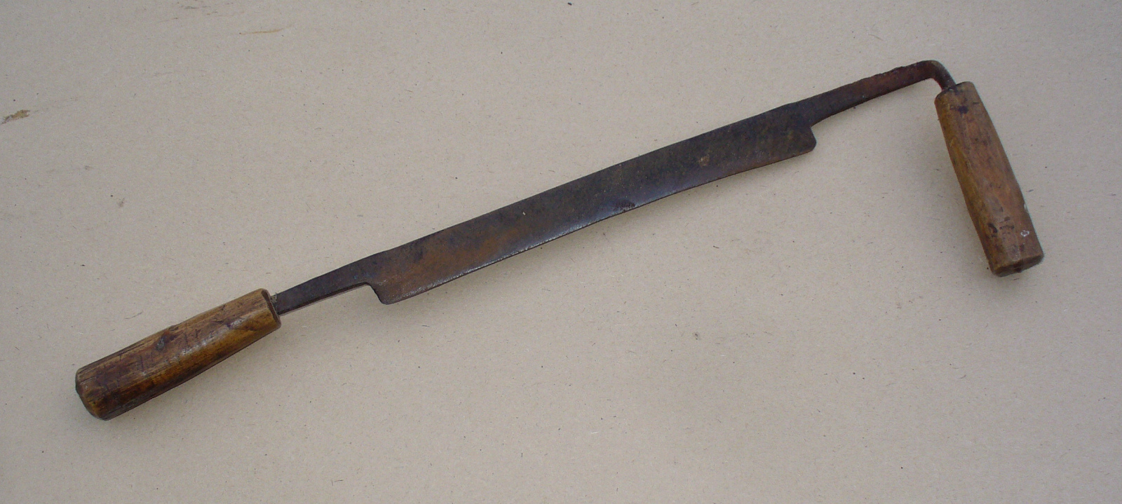 Струг - инструмент для снятия коры, строгания брёвен и клёпок в бондарном деле.